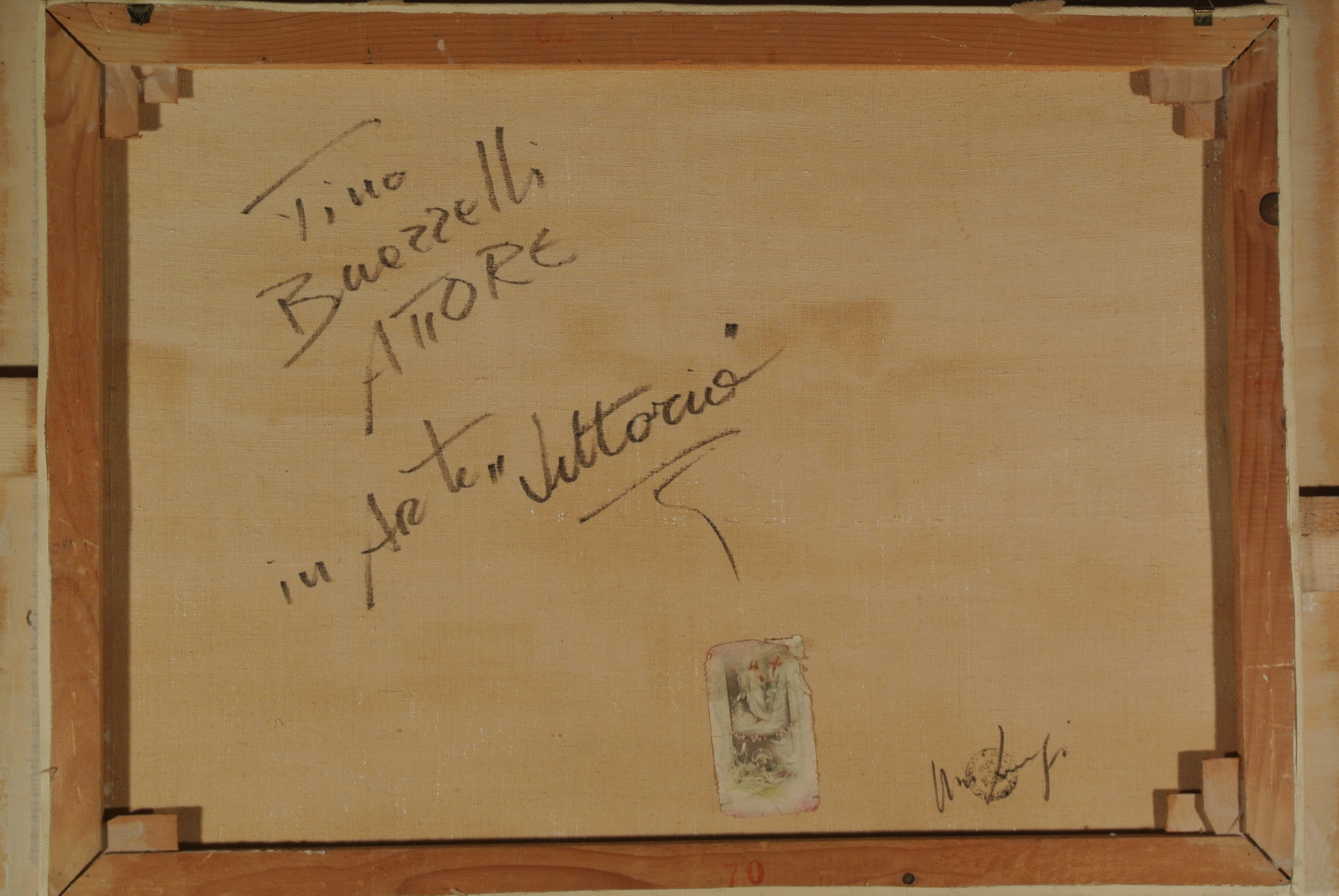 Tino Buazzelli Attore in Arte "Vittorio", Olio su tela cm.50X70 (Retro)